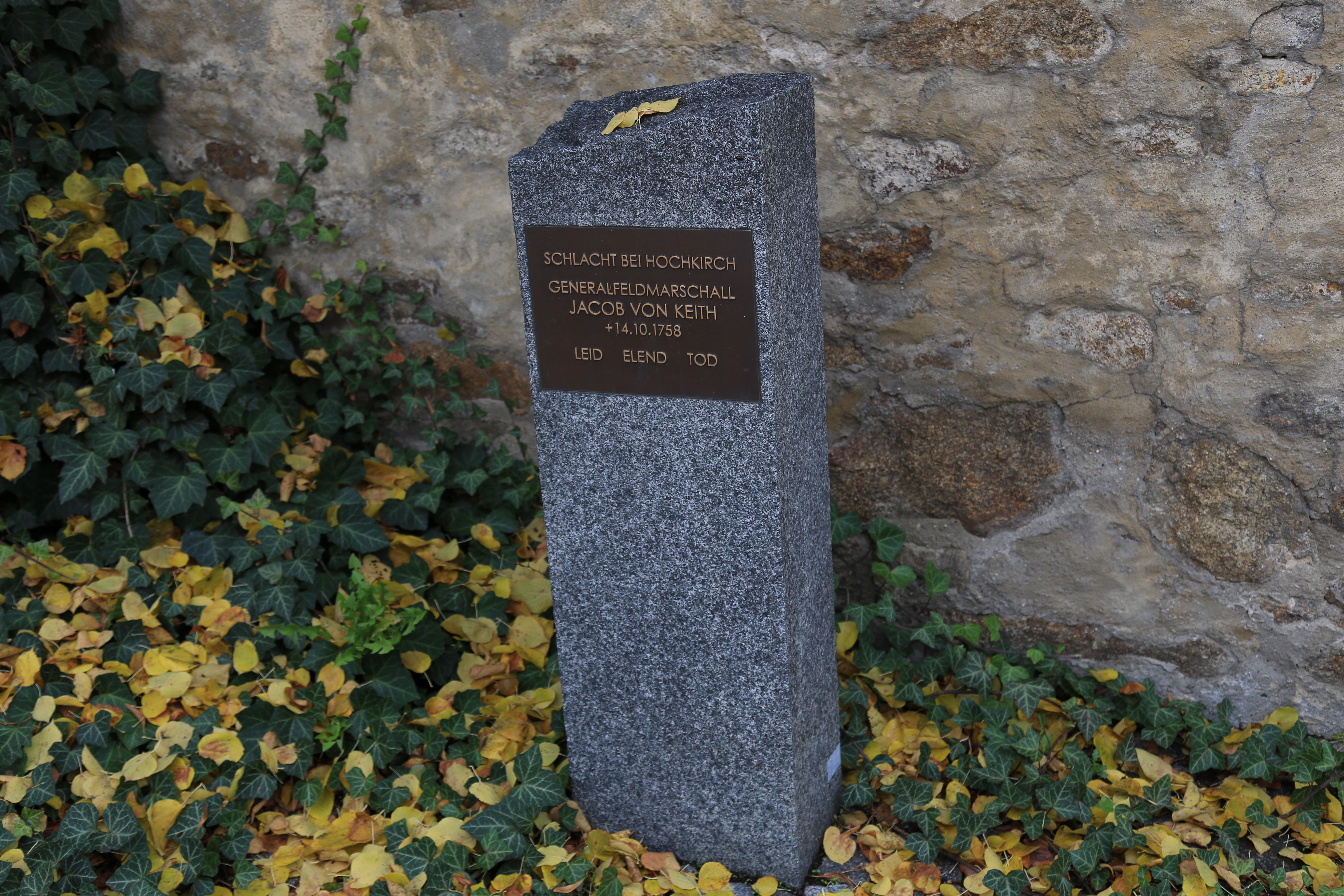 Hochkirch Kirche (9)